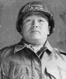 강문봉 중장